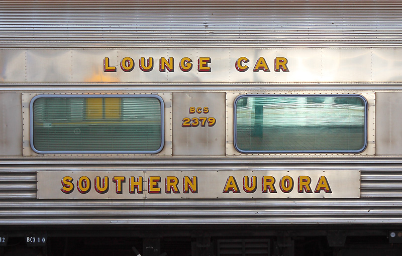 Vagnen BCS 2379 med namnskylten Southern Aurora.